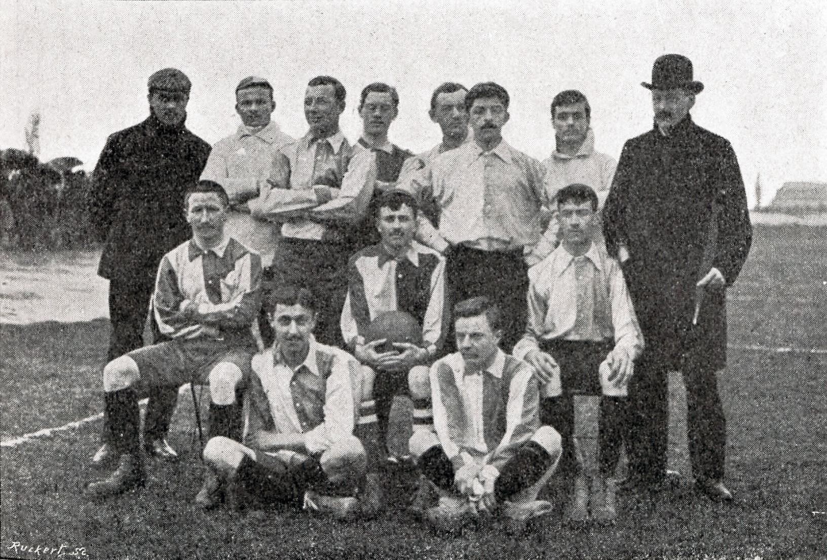 L'équipe de football du Havre Athletic Club le 14 avril 1901 lors du premier match de la finale du championnat de France